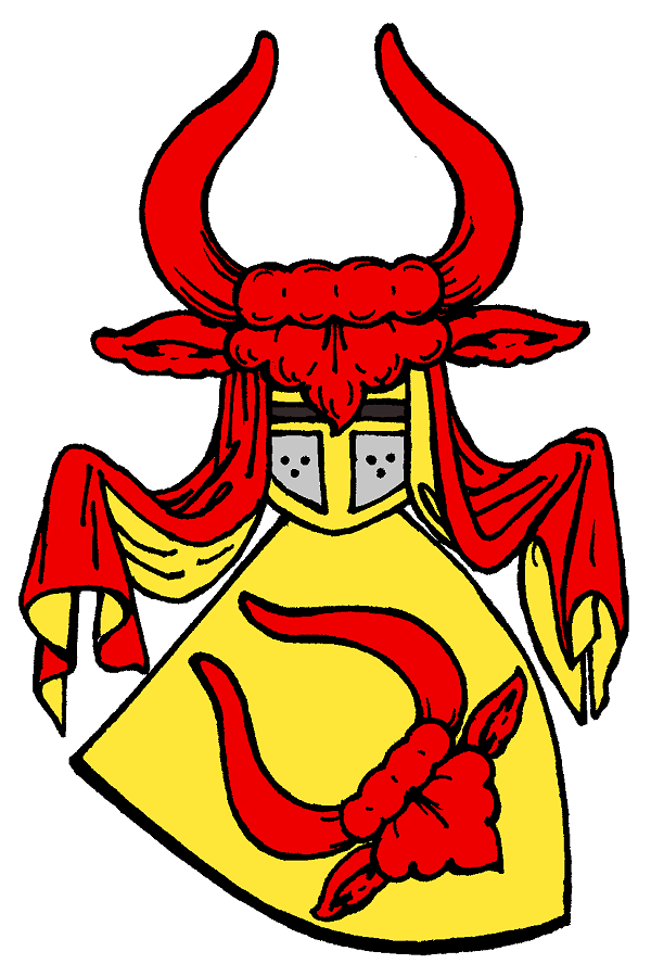 Wappen derer von Oxenstierna